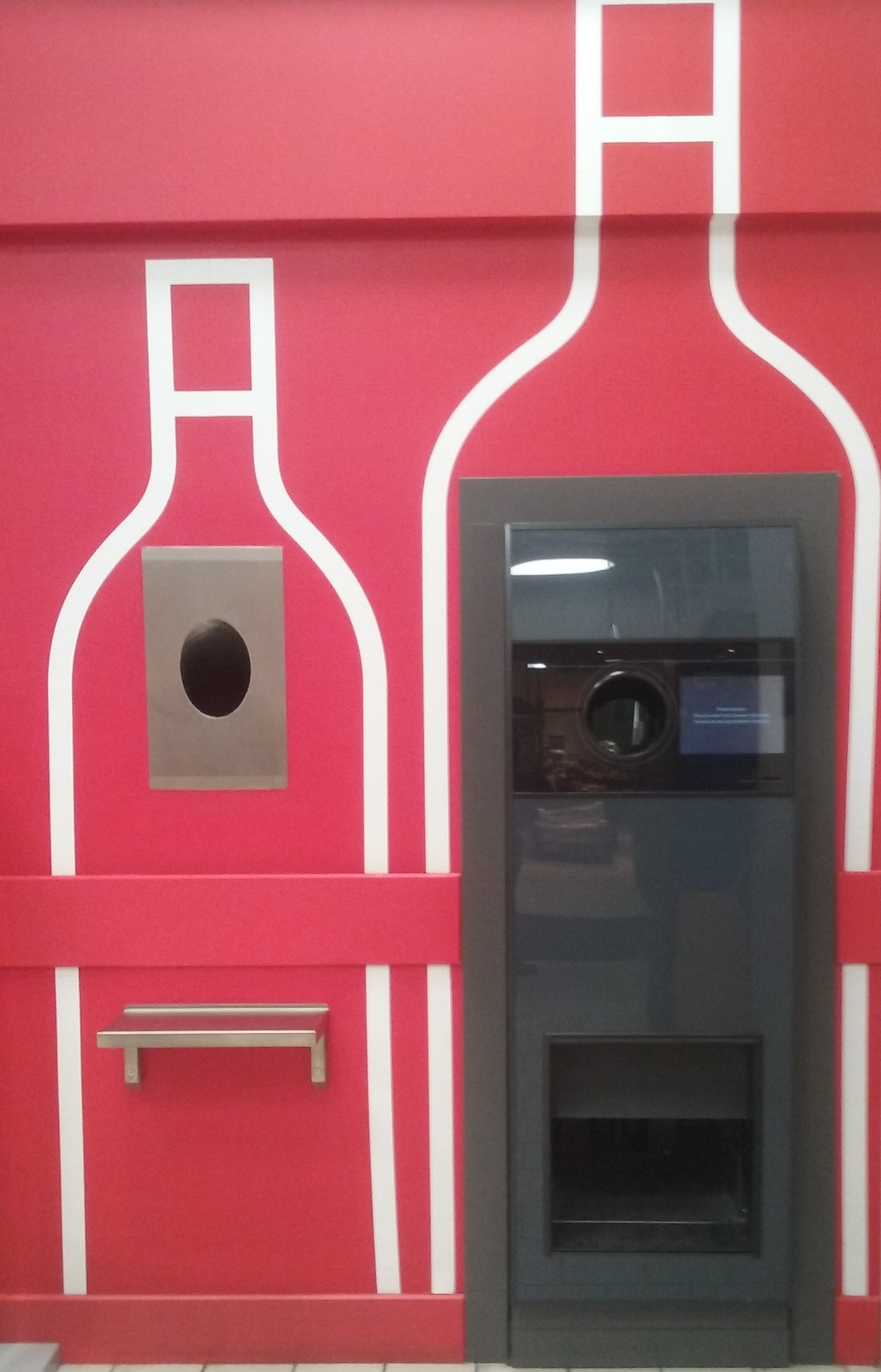 Automat do przyjmowania butelek zwrotnych w 60-tysięcznym Tomaszowie Mazowieckim Warszawska róg Szerokiej